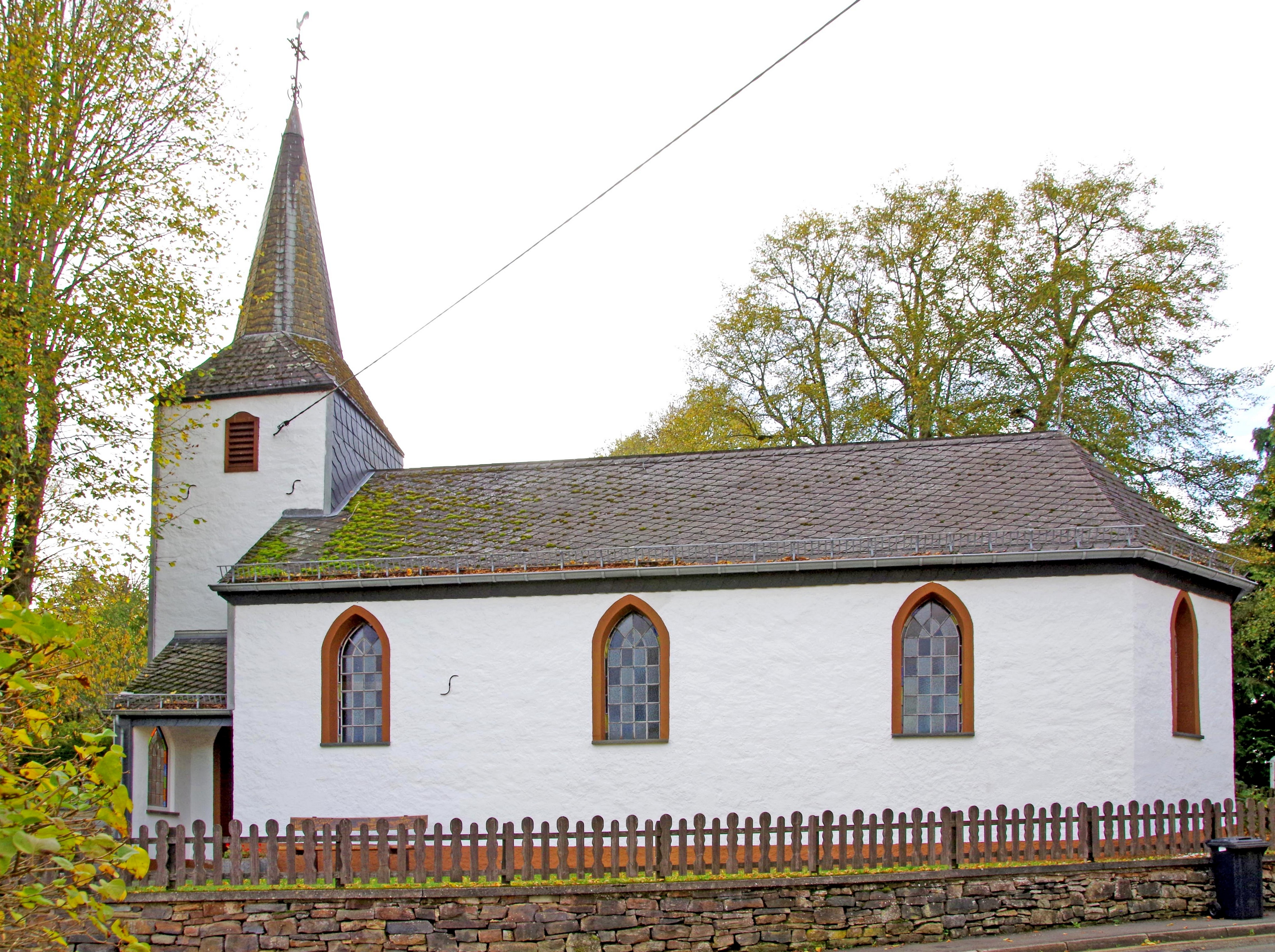 St. Antonius (Schnorrenberg), Südostseite